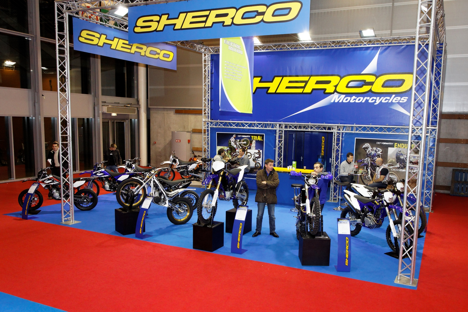 Vue du salon de la moto 2011 à Paris.